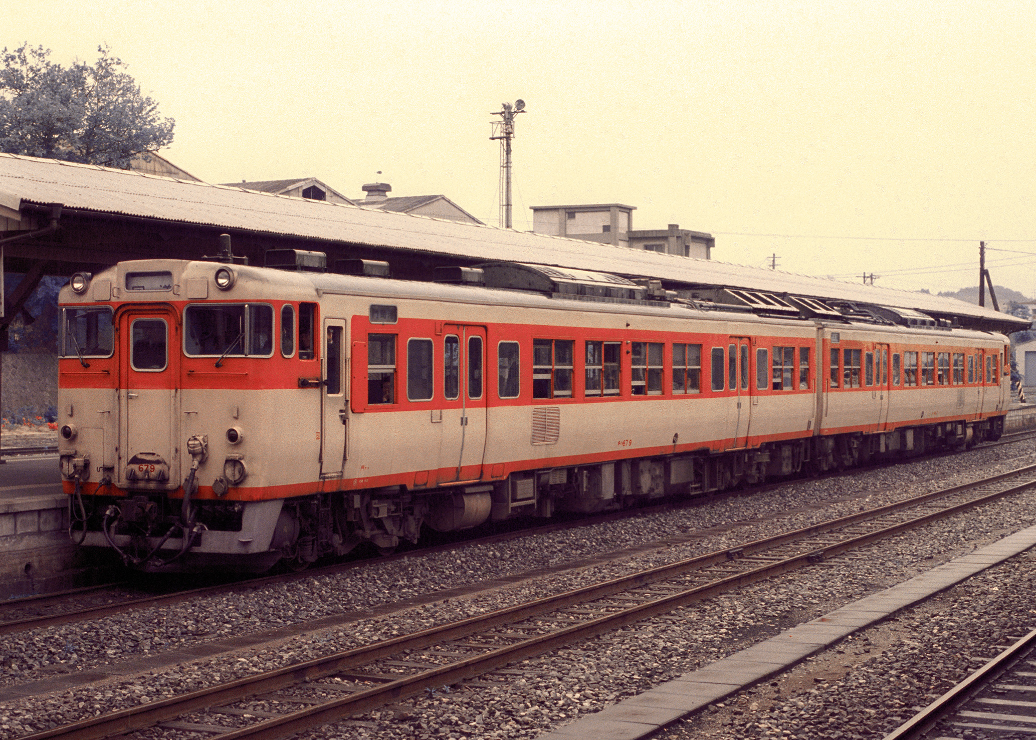 国鉄キハ66系気動車 キハ67 9+キハ66 9